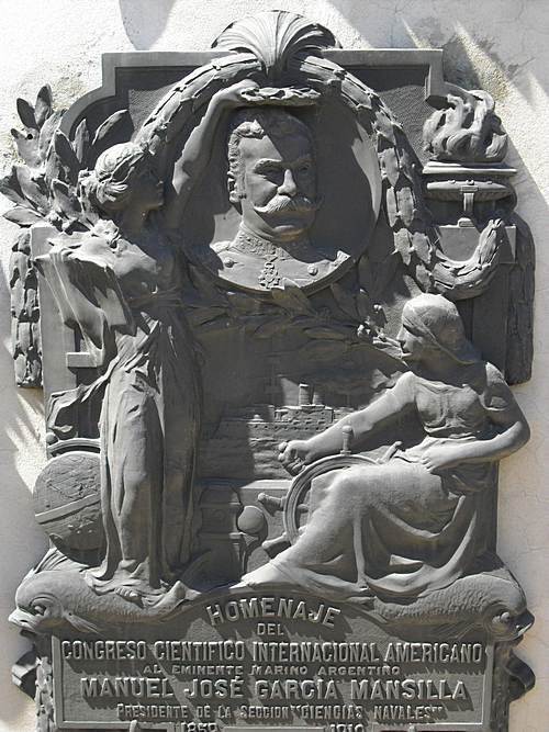 Fotografía de una de las placas sitas en la tumba del contraalmirante Garcia Mansilla.